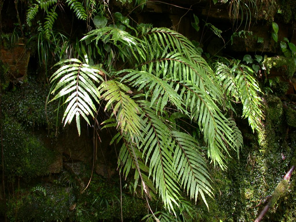 Osmunda banksiifolia:シロヤマゼンマイ 6/08/10 沖縄本島：Okinawa Island, Japan